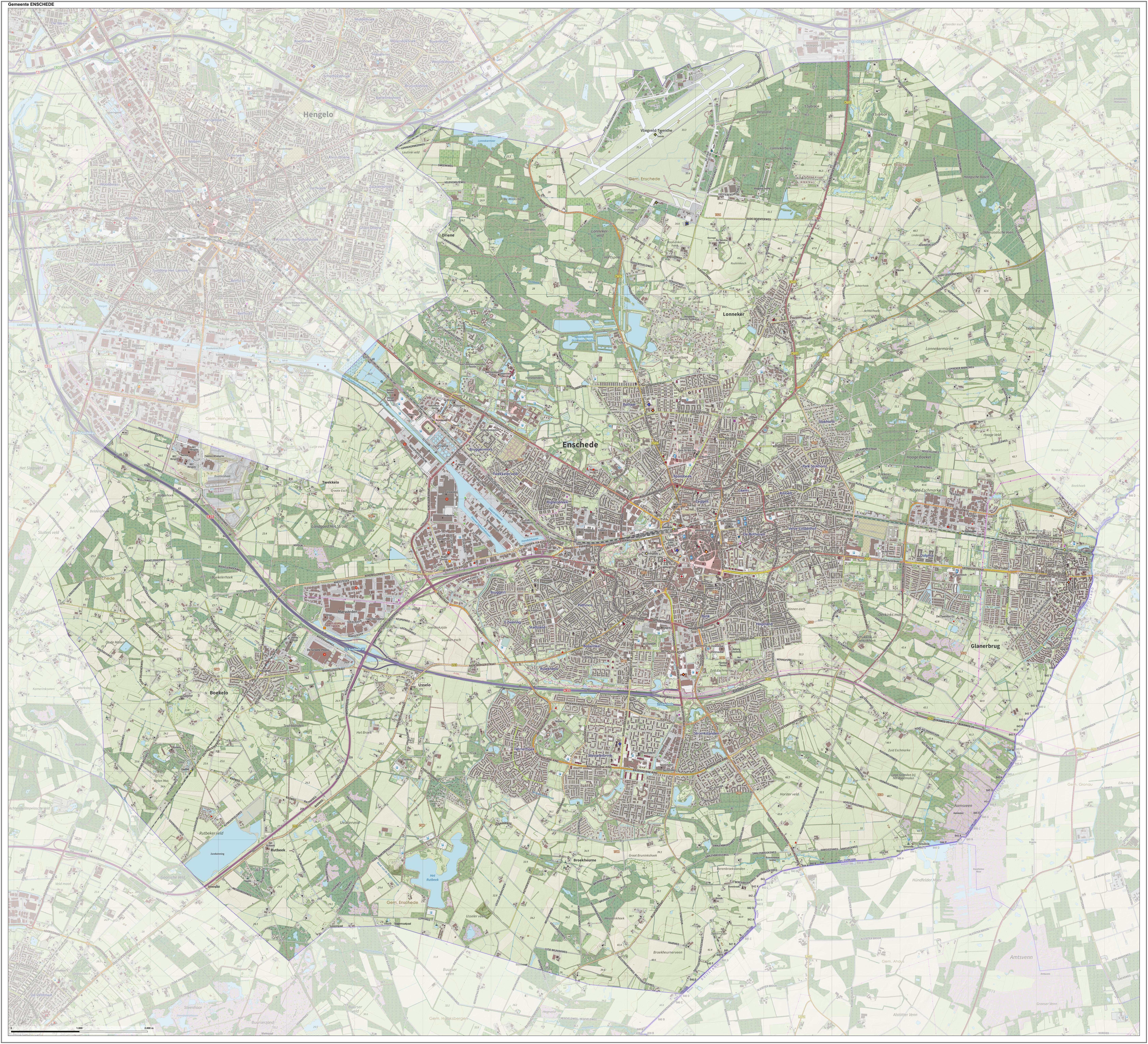 Topografische gemeentekaart. Resolutie: 400 pixels/km. Kaartbeeld samengesteld uit de open geodata van de Top10NL en Top25namen (Kadaster), Creative Commons-BY licentie. Gebouwvlakken uit open geodata BAG extract. Wegen uit de OpenStreetMap, OpenStreetMap community. Reliëfschaduw uit de Actuele Hoogtekaart AHN2. Samenstelling en kleurenschema: Jan-Willem van Aalst, met QGIS. Zie ook de Legenda.